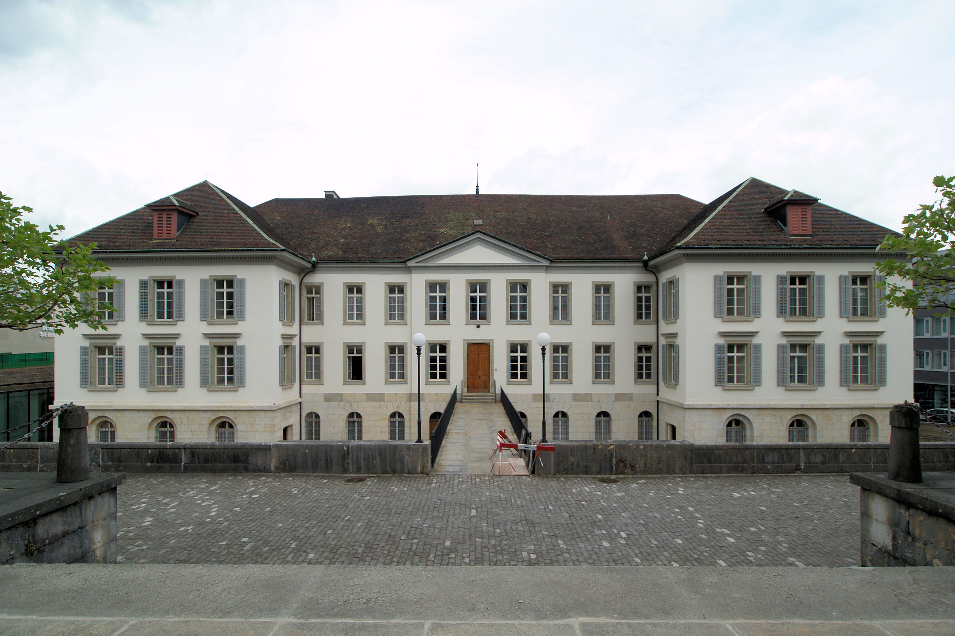 Das Regierungsgebäude des Kanton Aargau in Aarau. Blick vom Grossratgebäude auf die Rückseite (Südansicht).